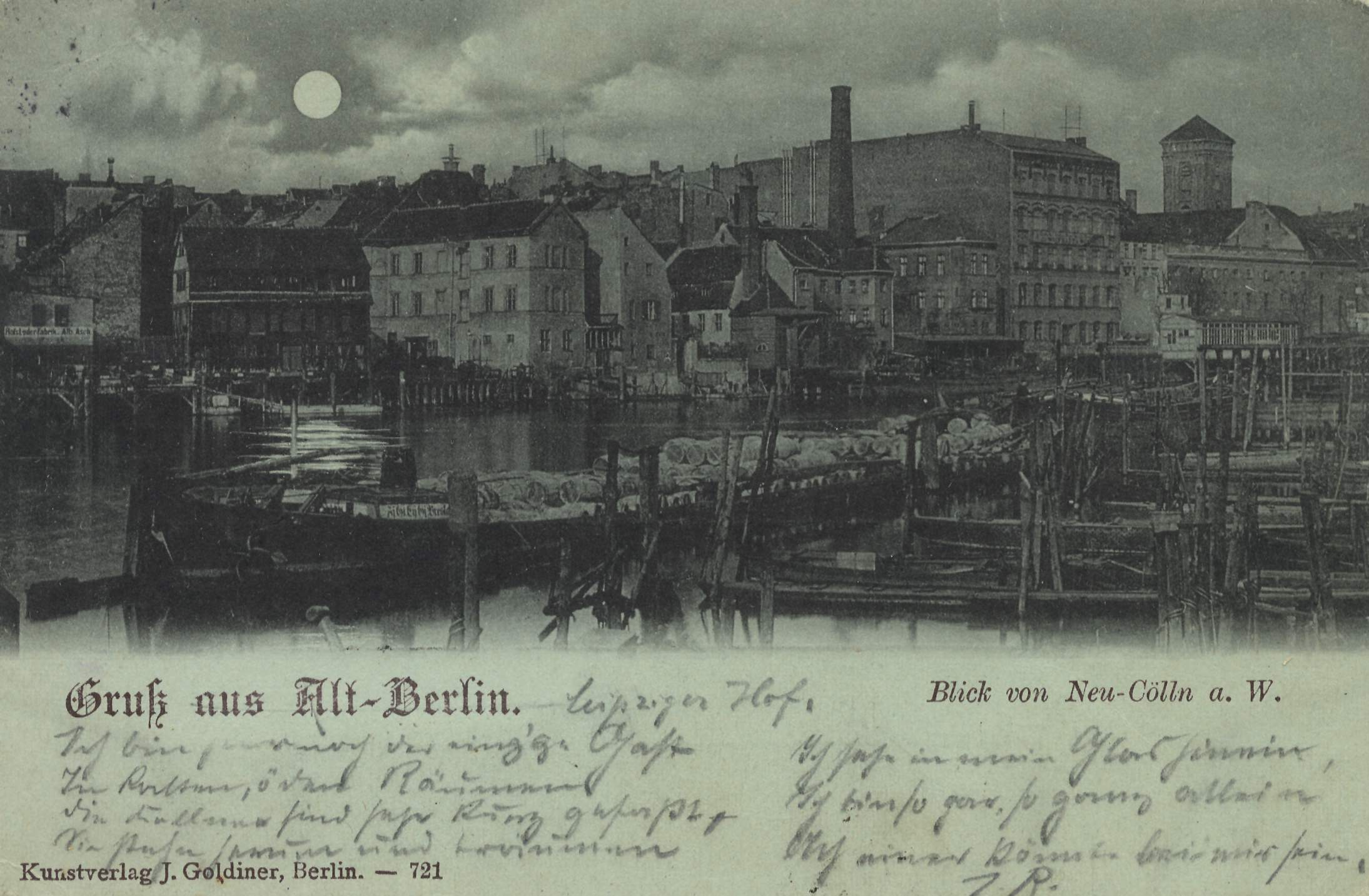 Alt-Berlin